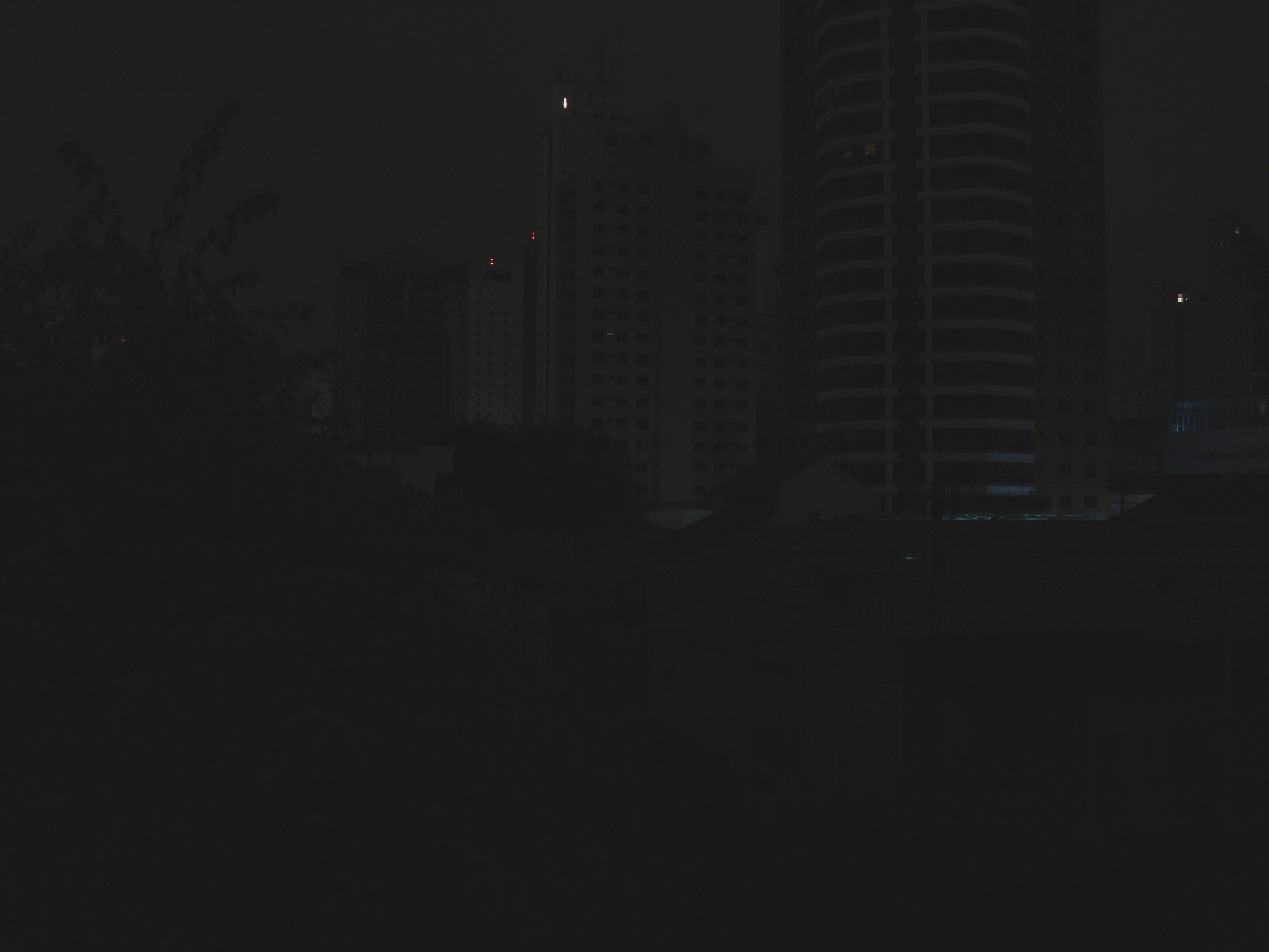 Panorama do Alto de Santana no dia 10 de novembro de 2009 durante o blecaute.